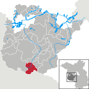 Rabenstein/Fläming in Brandenburg (Country) - District Potsdam-Mittelmark